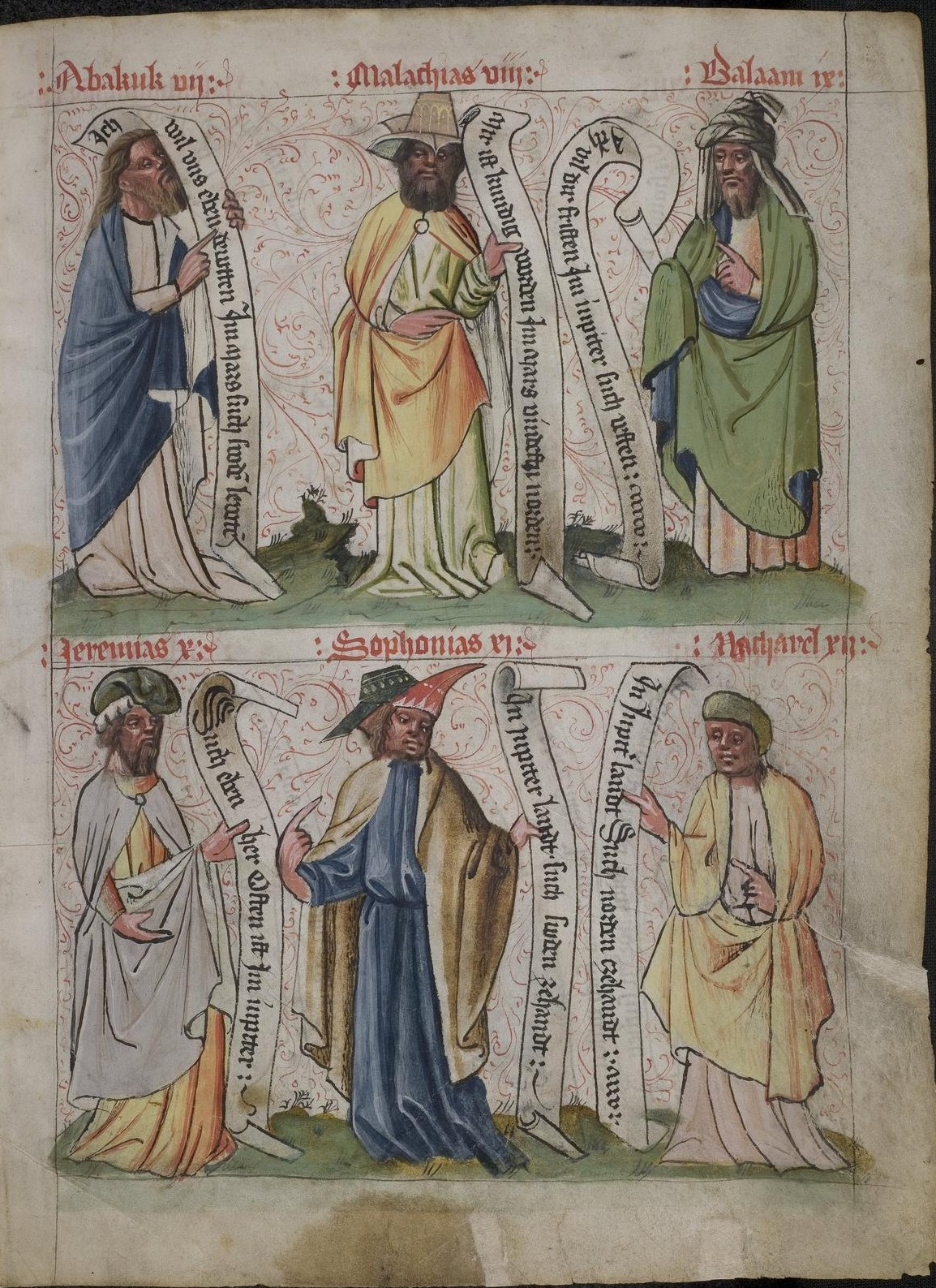 Codex Palatinus germanicus 7, Blatt 3r der Handschrift: Wahrsagebuch, 6 Wahrsager, Namenszusätze: "Abakuk", "Malachias", "Balaam", "Jeremias", "Sophonias", "Nachanel".